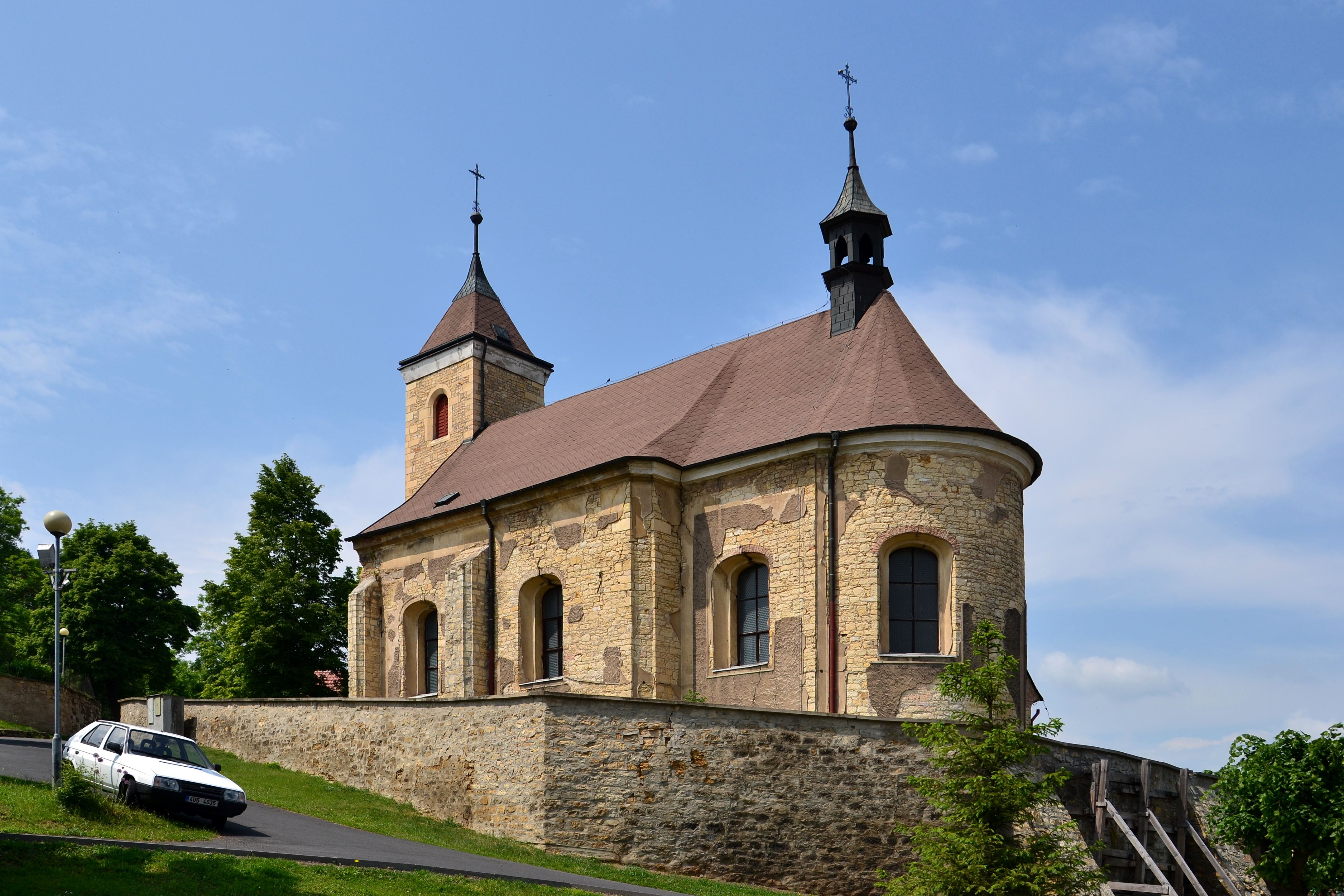 Kostel Všech svatých, Raná (okres Louny).